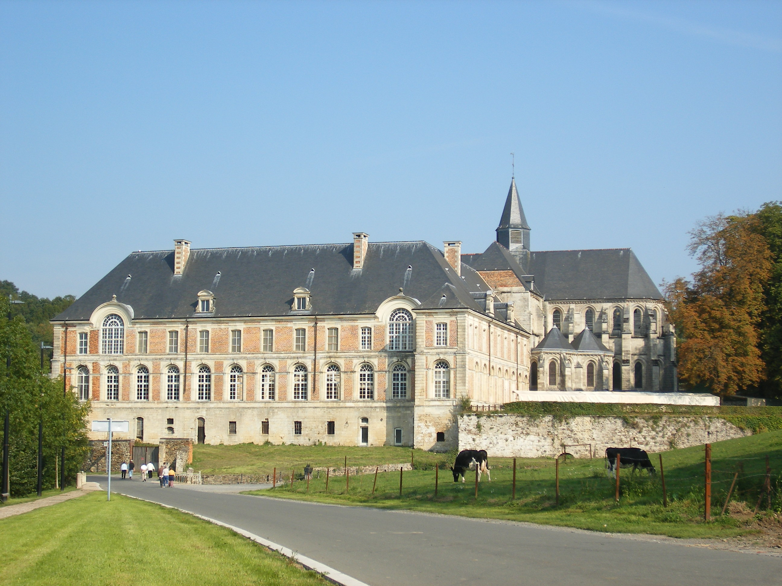 Abbaye de Saint-Michel en Thiérache - Vue Générale